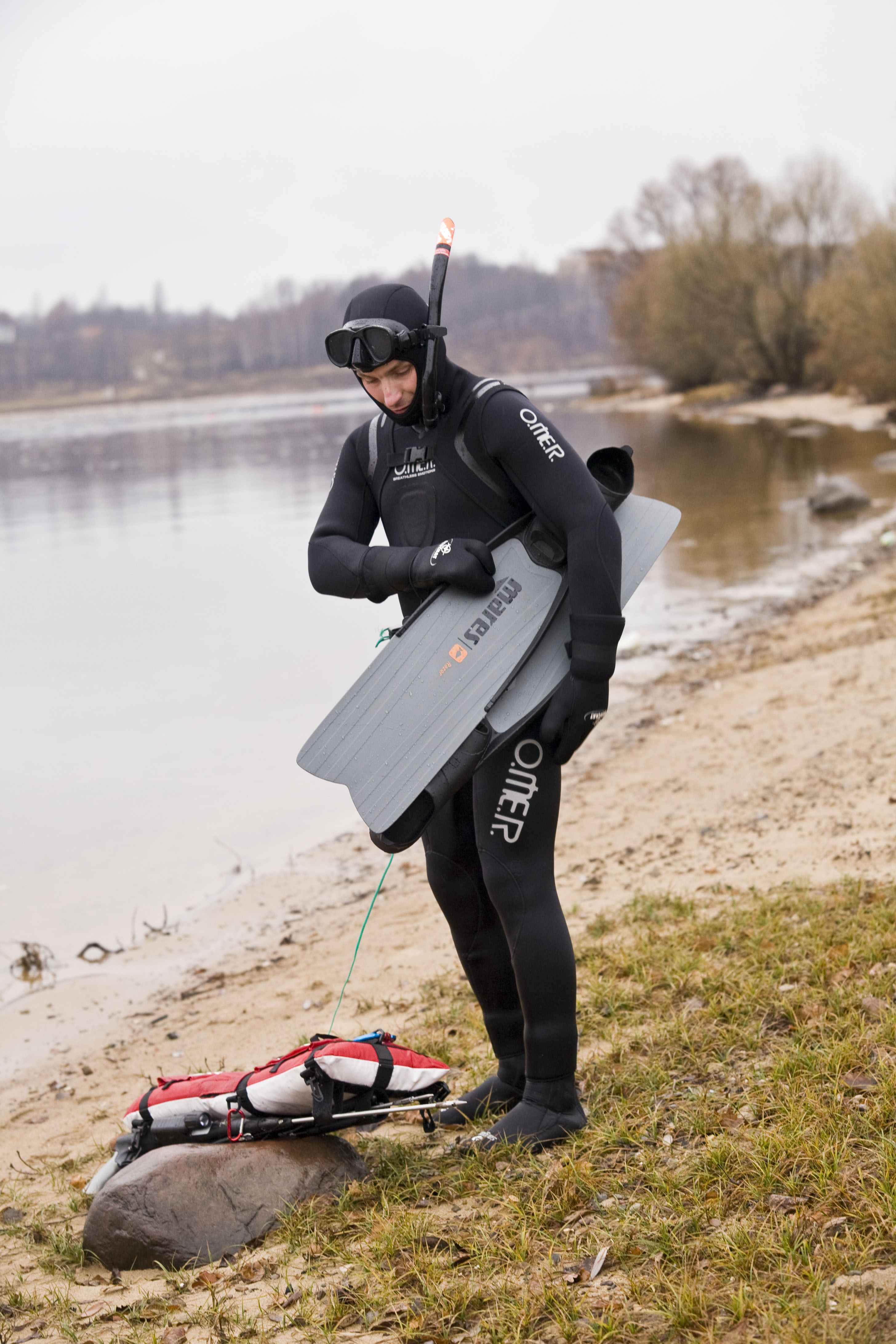 Гидрокостюм для подводной охоты OMER 9 мм